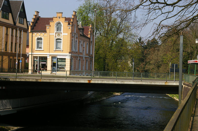 Werrebrücke am Lübbertor